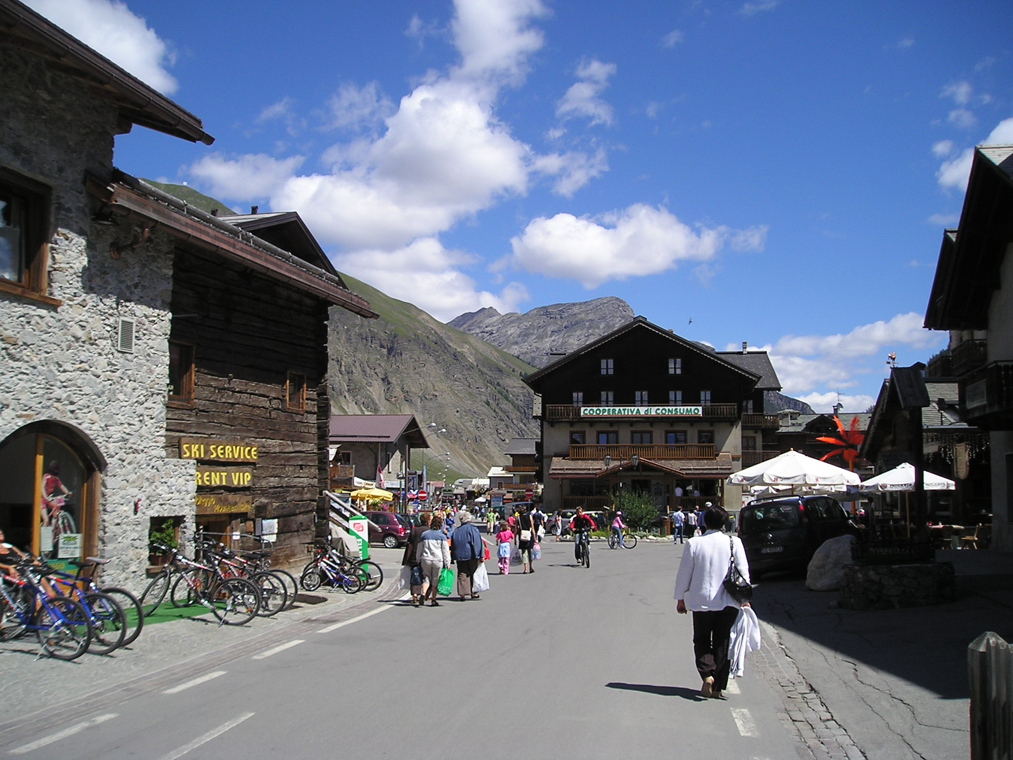 Centro di Livigno; autore Massimo Macconi